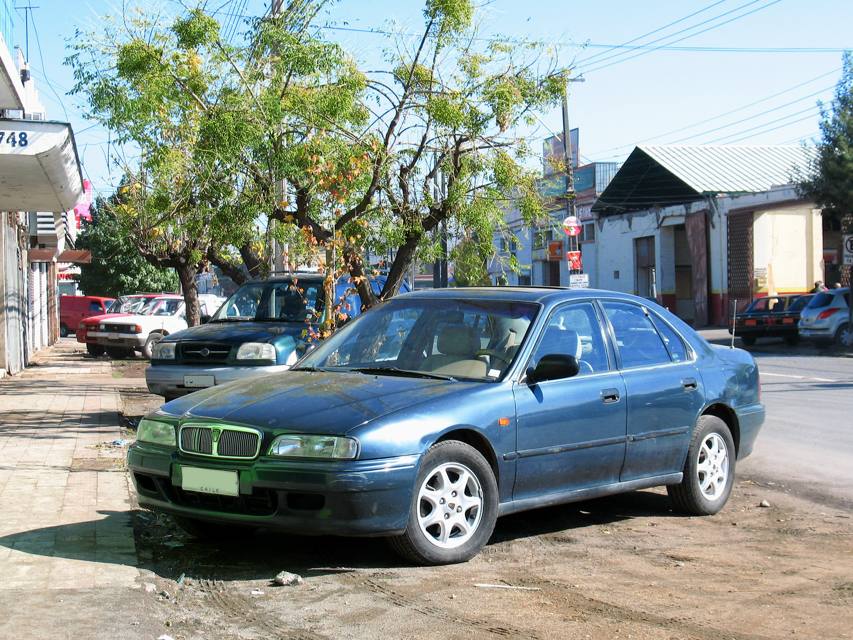 Rover 620 Si Lux 1998